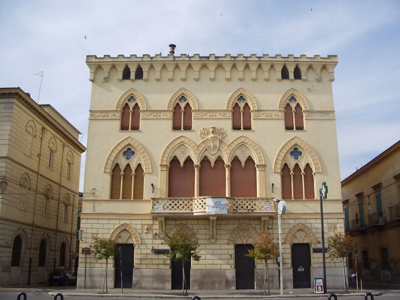 Facciata di Palazzo Manfredi